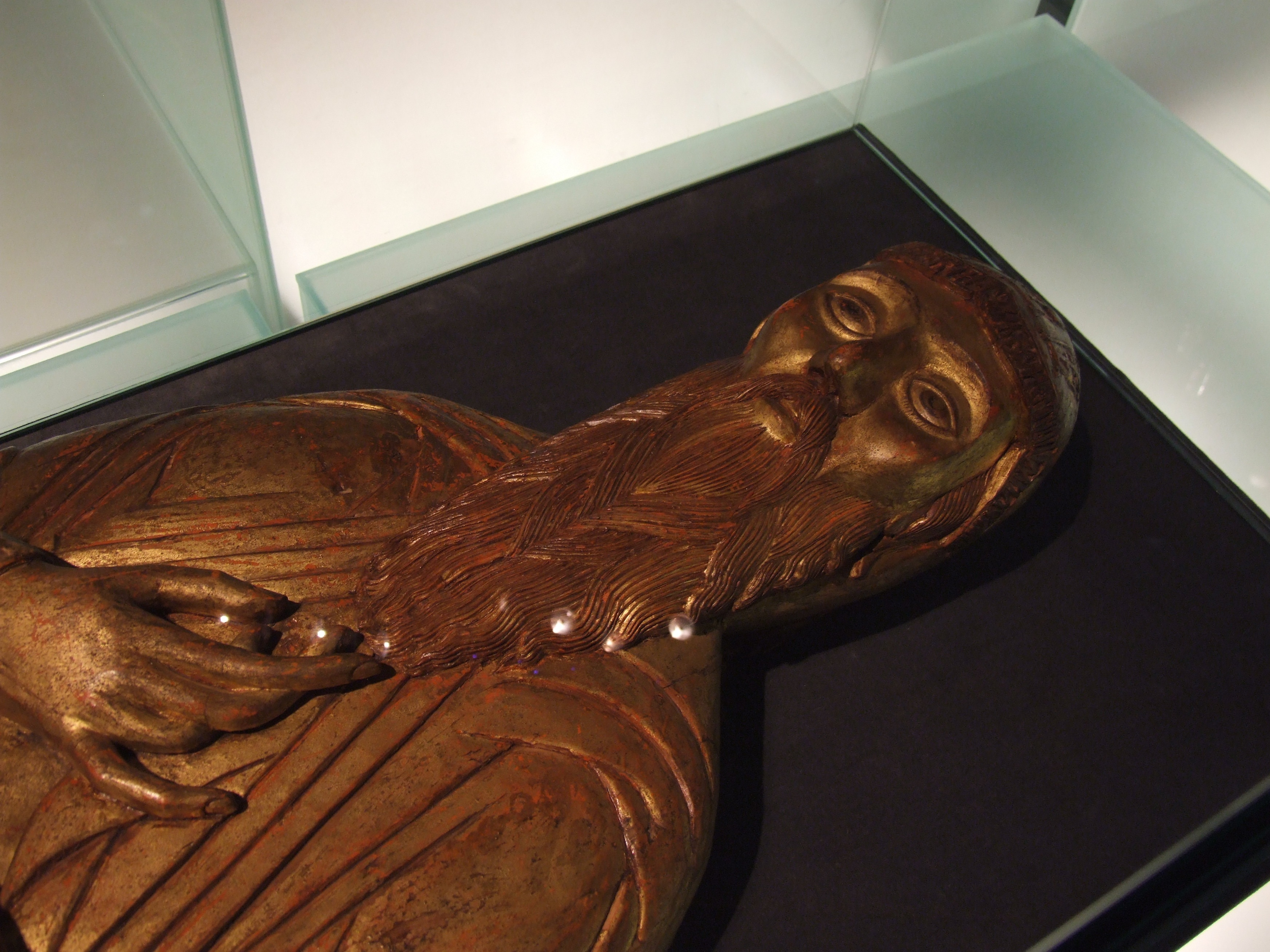 Список экспонатов РЕЛЬЕФНАЯ ФИГУРА С КРЫШКИ РАКИ. СВЯТОЙ АНТОНИЙ РИМЛЯНИН Конец XVI – начало XVII века Новгород Дерево; резьба, золочение 159 х 43 х 10 Поступила в 1898 году из МАХ Происходит из Софийского собора Великого Новгорода ГРМ инв. ДРД-494